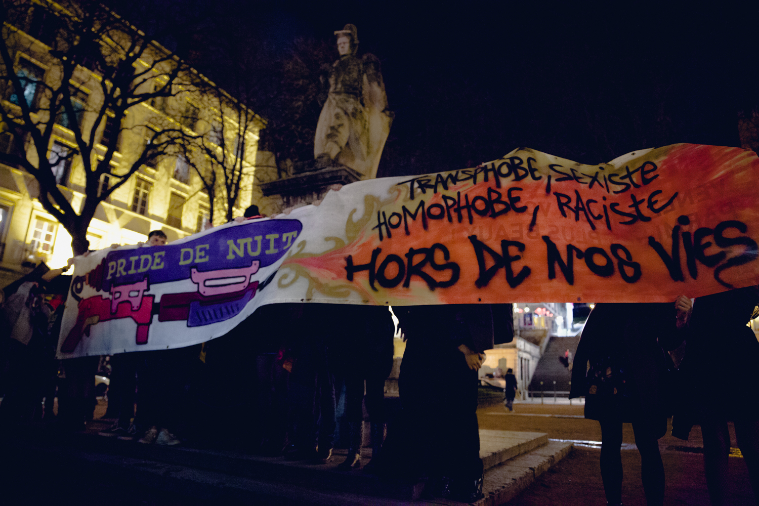 Extrait d'un reportage photo de la Pride de Nuit de Lyon en 2018 organisée par plusieurs collectifs militants - Photo : Arsène Marquis